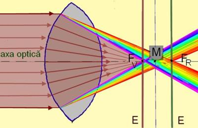 Aberaţie cromatică la o lentilă convergentă